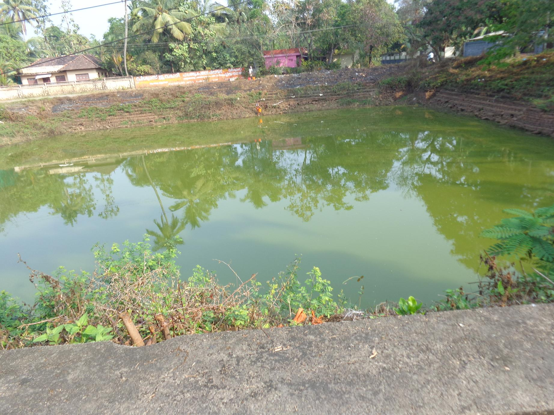 തൃച്ചിറ്റാറ്റ് ക്ഷേത്രക്കുളം (ശംഖതീർത്ഥം)